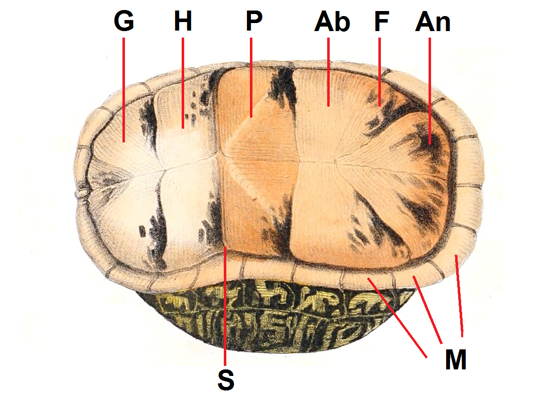 Tagged and cutted version of File:Terrapene carolinaHolbrookV1P02.jpg